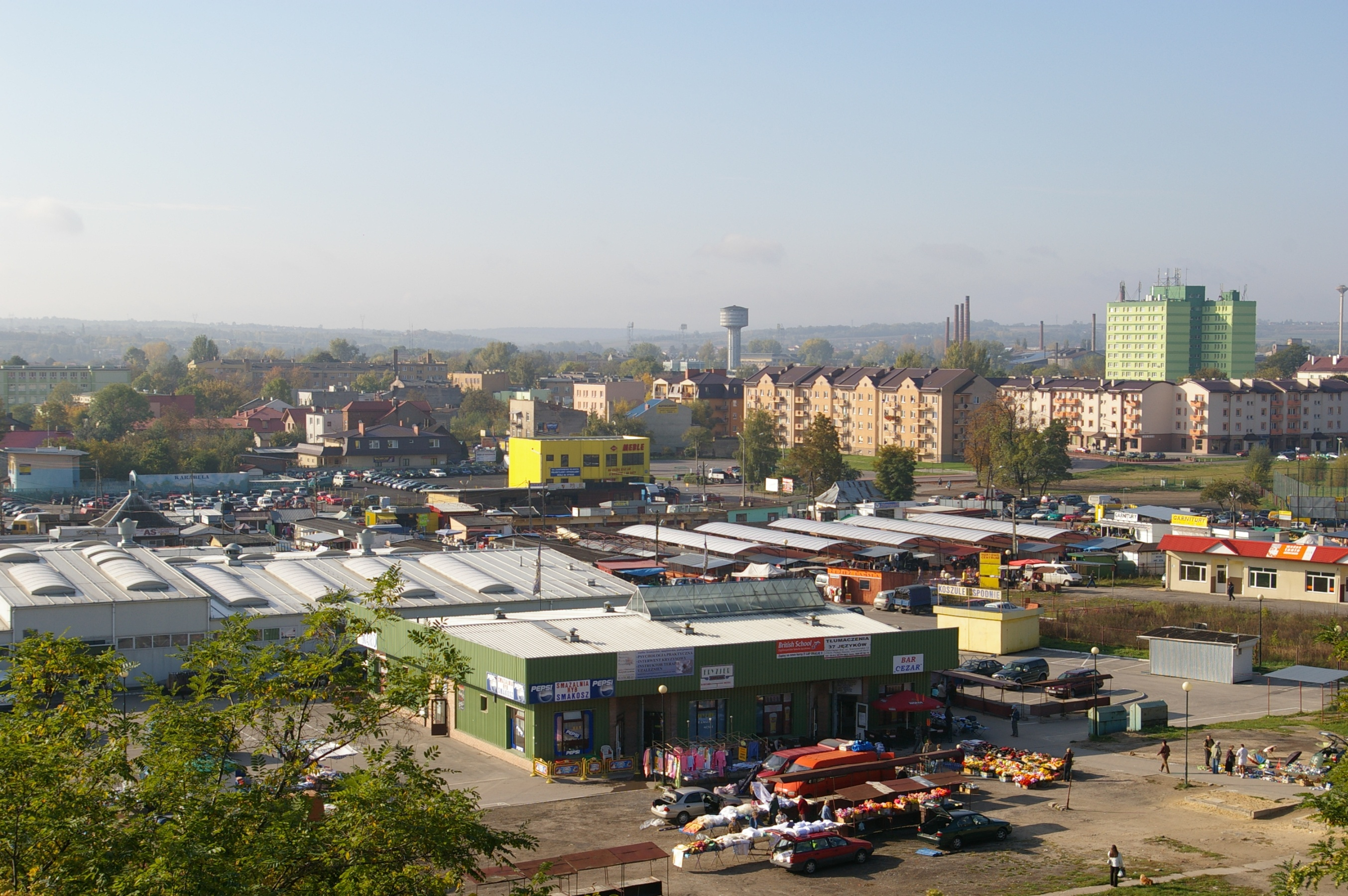 Targowisko miejskie w Ostrowcu Świętokrzyskim